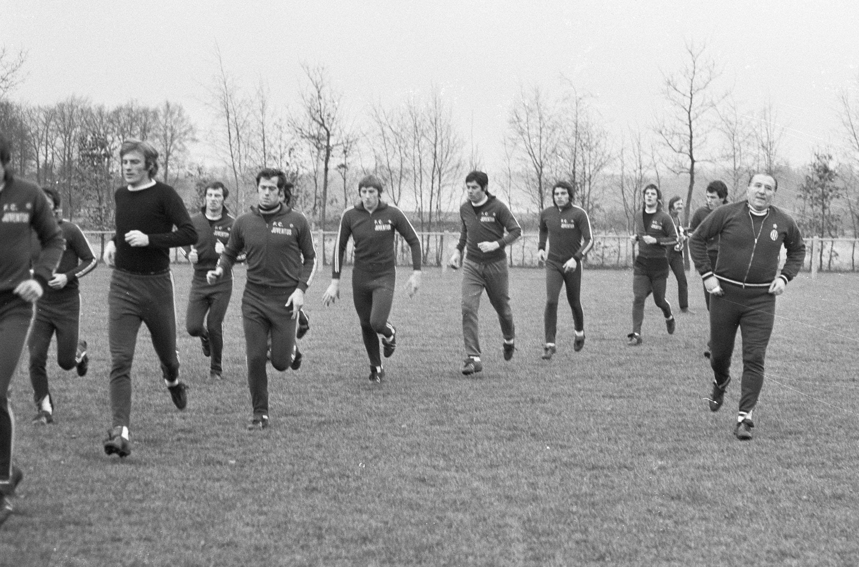 Voetbalclub Juventus (Italie) traint in Enschede; training, rechts hulptrainer Čestmír Vycpálek.